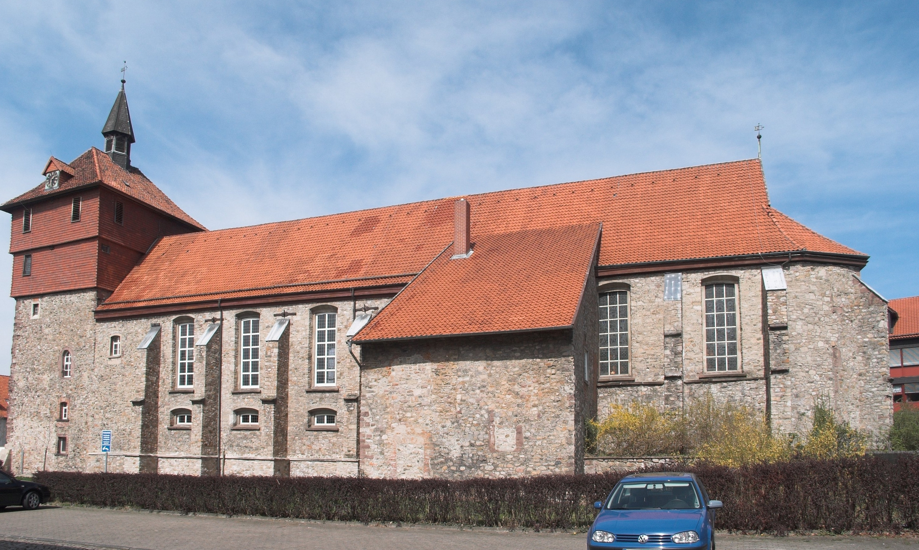 Kirche St. Jacobi in Osterode am Harz